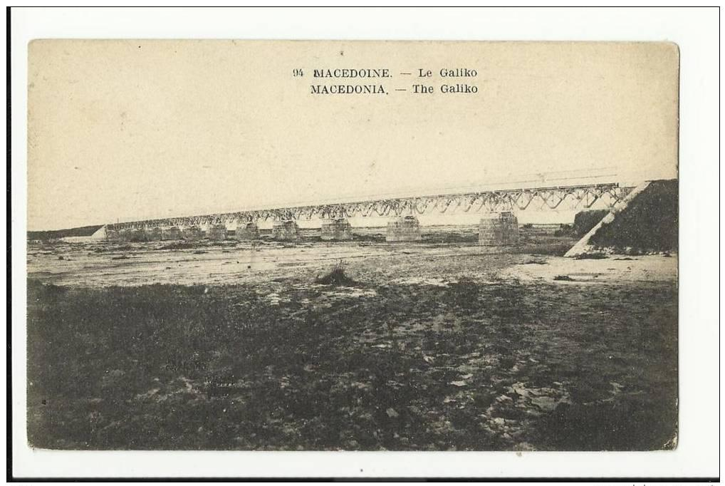 Мост на Галик през Първата световна война